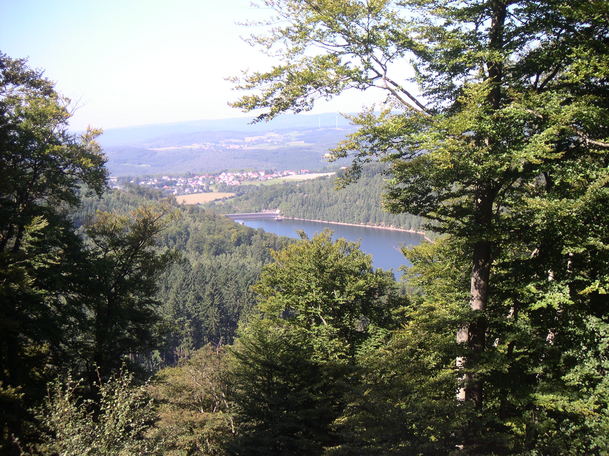 Saar-Hunsrück-Steig, Blick auf die Primstalsperre